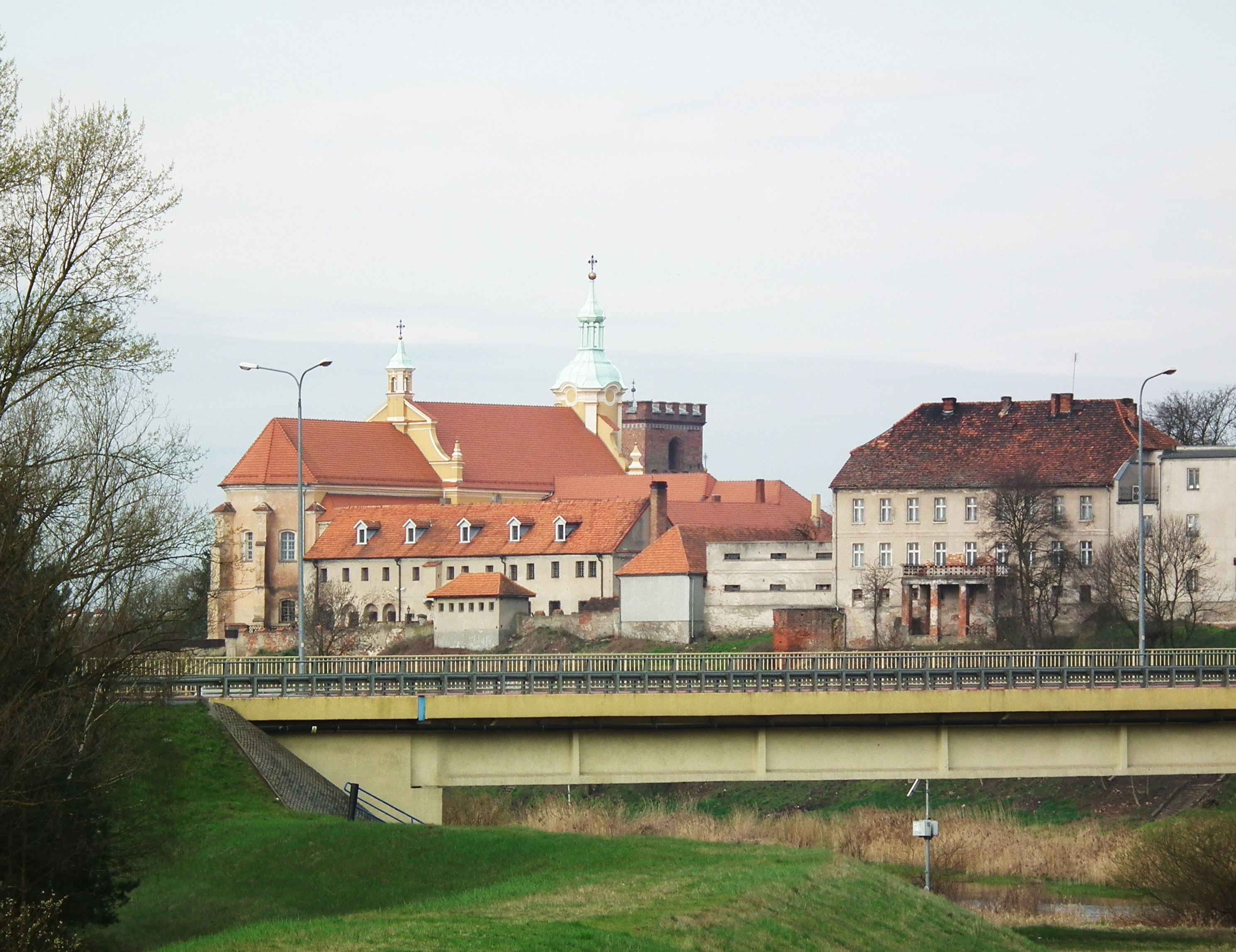 Widok na starówkę w Pyzdrach z okolic wsi Walga.